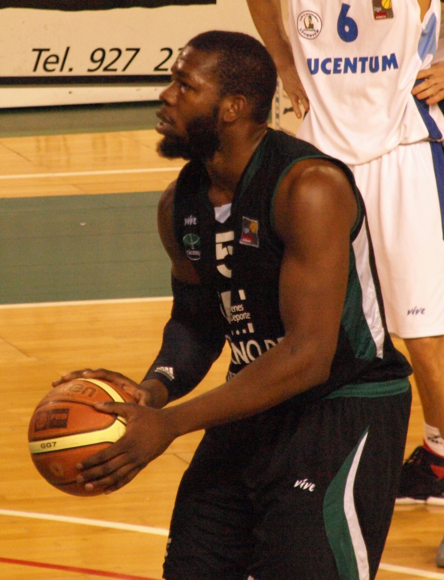 El jugador nigeriano de baloncesto Olu Ashaolu en un partido con su club, el Cáceres Ciudad del Baloncesto, en enero de 2013